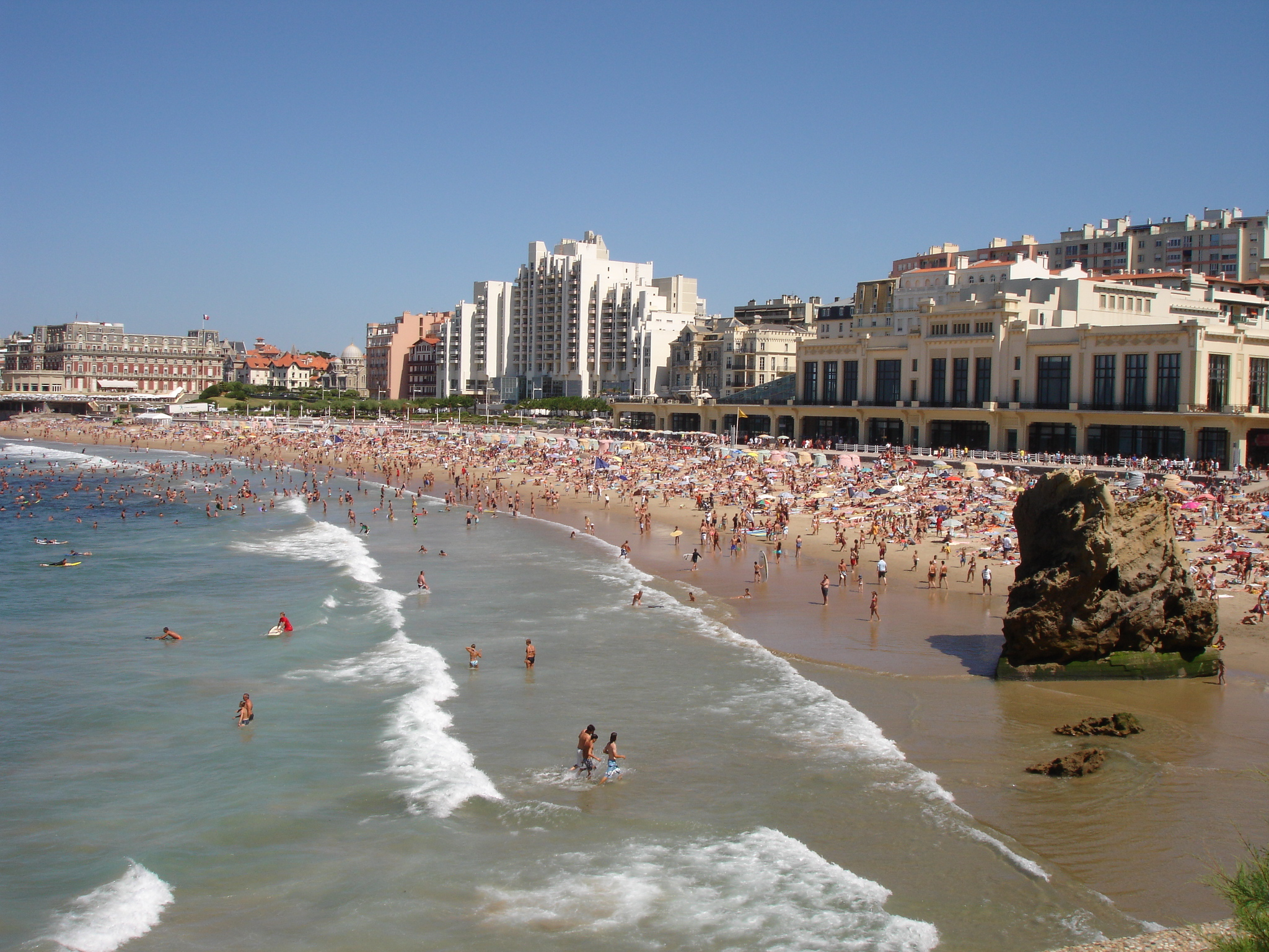 Plages et casino de Biarritz, Pyrénées-Atlantiques (France)